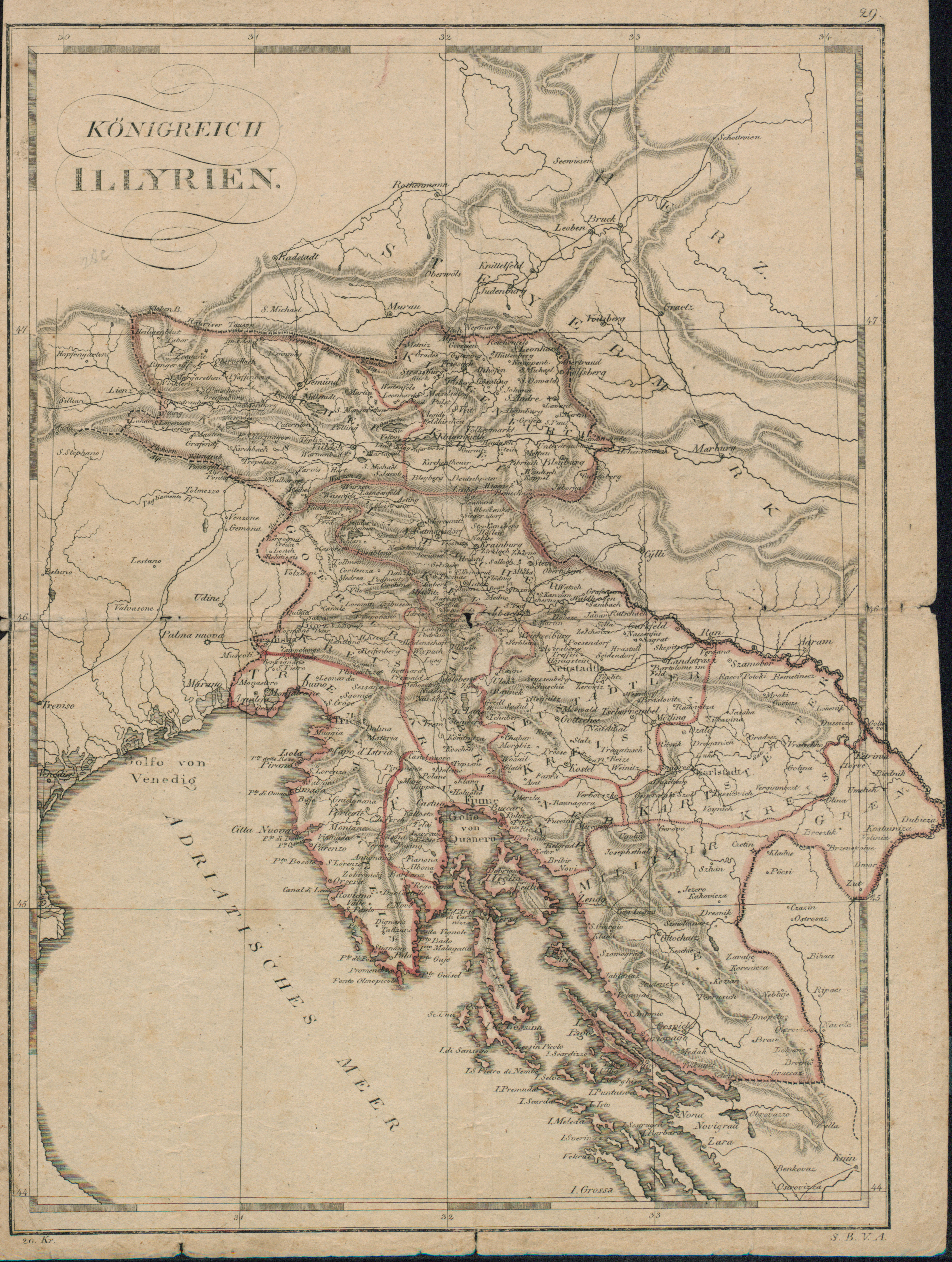 Upravni zemljevid Ilirskega kraljestva leta 1817